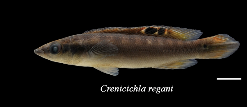 Crenicichla regani, barra escala: 1 cm. Bosque Nacional de Tapajós, Brasil. Silva-Oliveira C, Canto ALC, Ribeiro FRV (2016) Stream ichthyofauna of the Tapajós National Forest, Pará, Brazil. ZooKeys 580: 125-144.